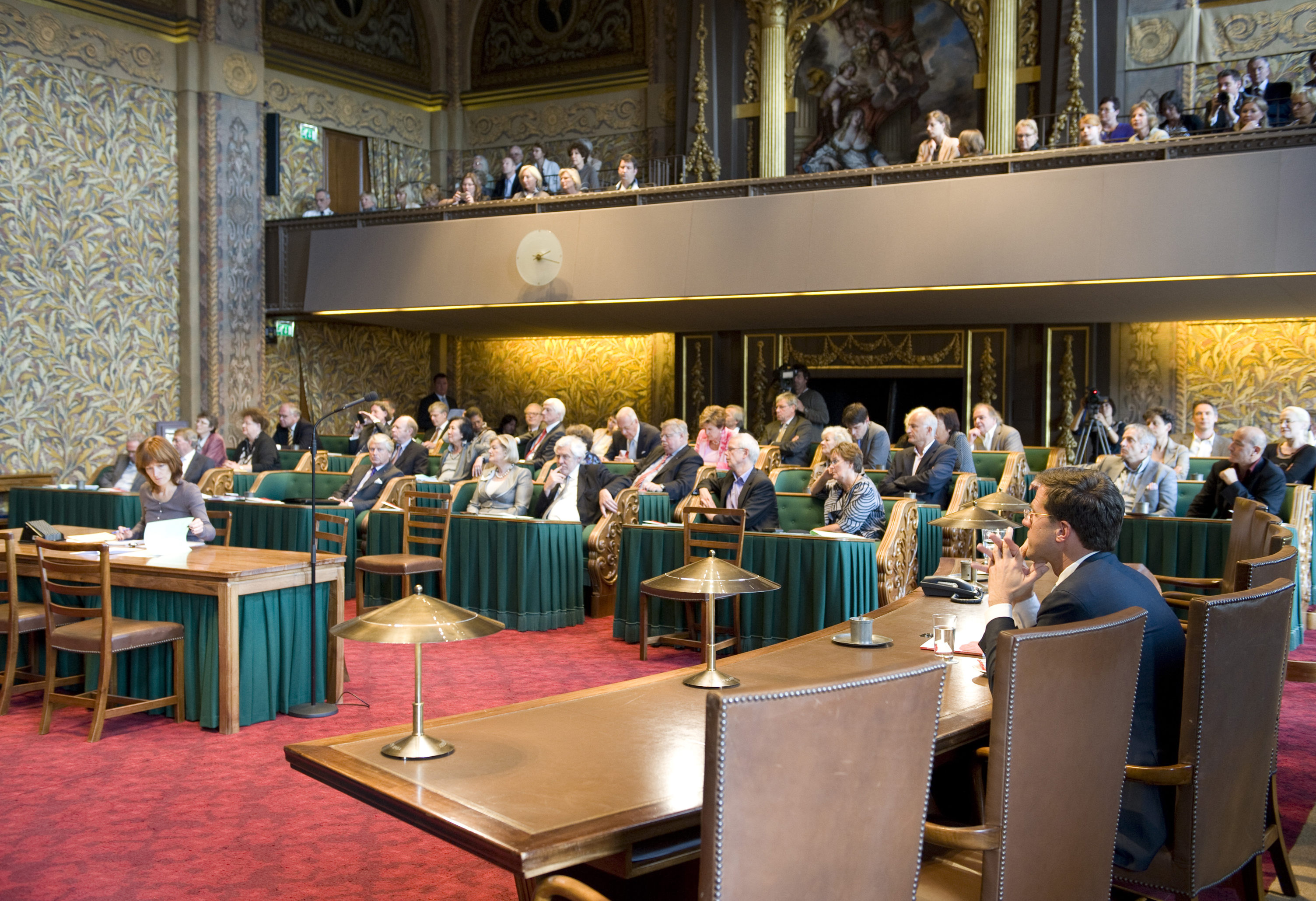 Minister-president Rutte in de vergaderzaal van de Eerste Kamer tijdens de laatste vergaderdag in oude samenstelling. Maandag 23 mei jl. zijn de nieuwe leden van de Eerste Kamer gekozen.